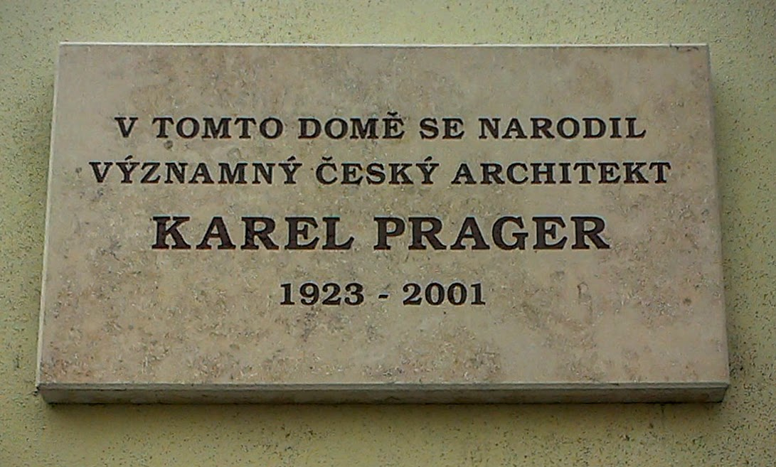 Pamětní deska Karlu Pragrovi na Masarykově náměstí v Kroměříži